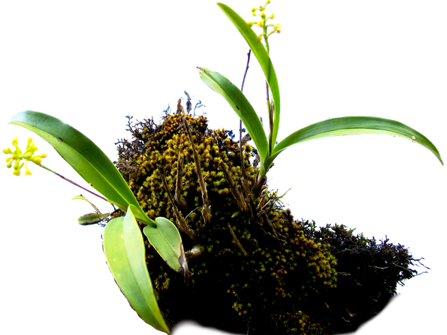 Polystachya concreta, fotografada em galhos de araucária.